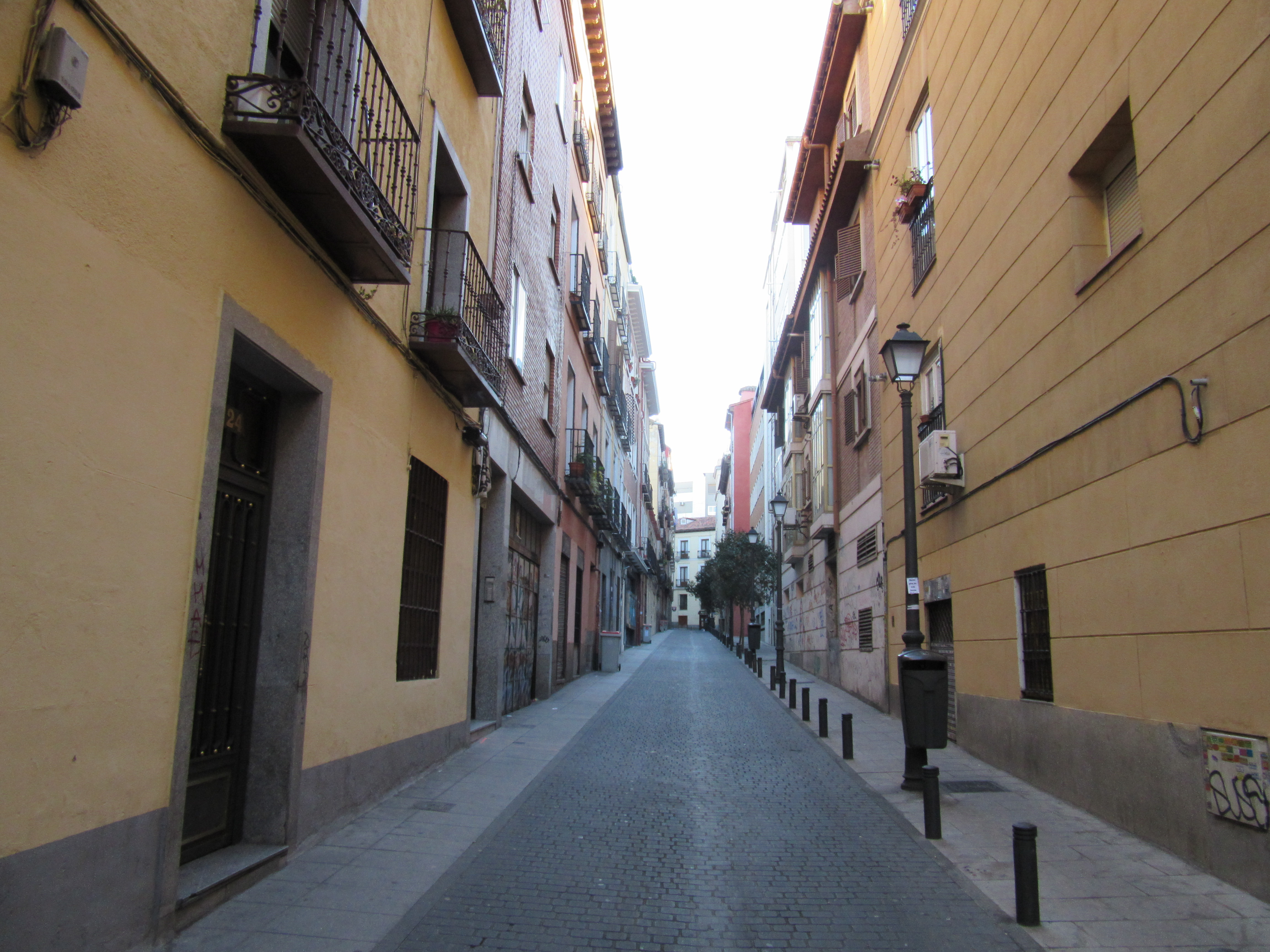 Madrid, Calle de la Cruz Verde